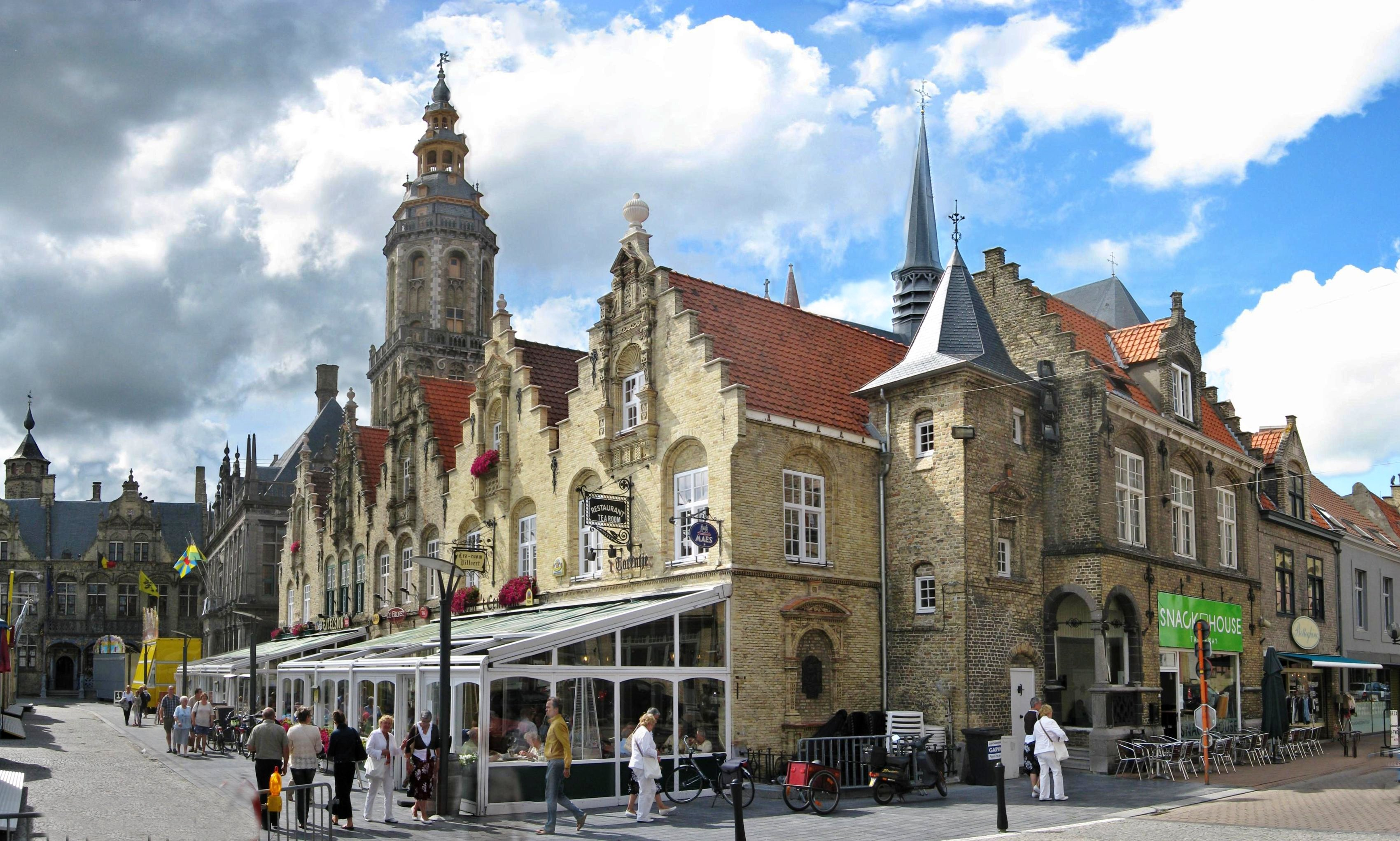 Stadtansicht in Veurne